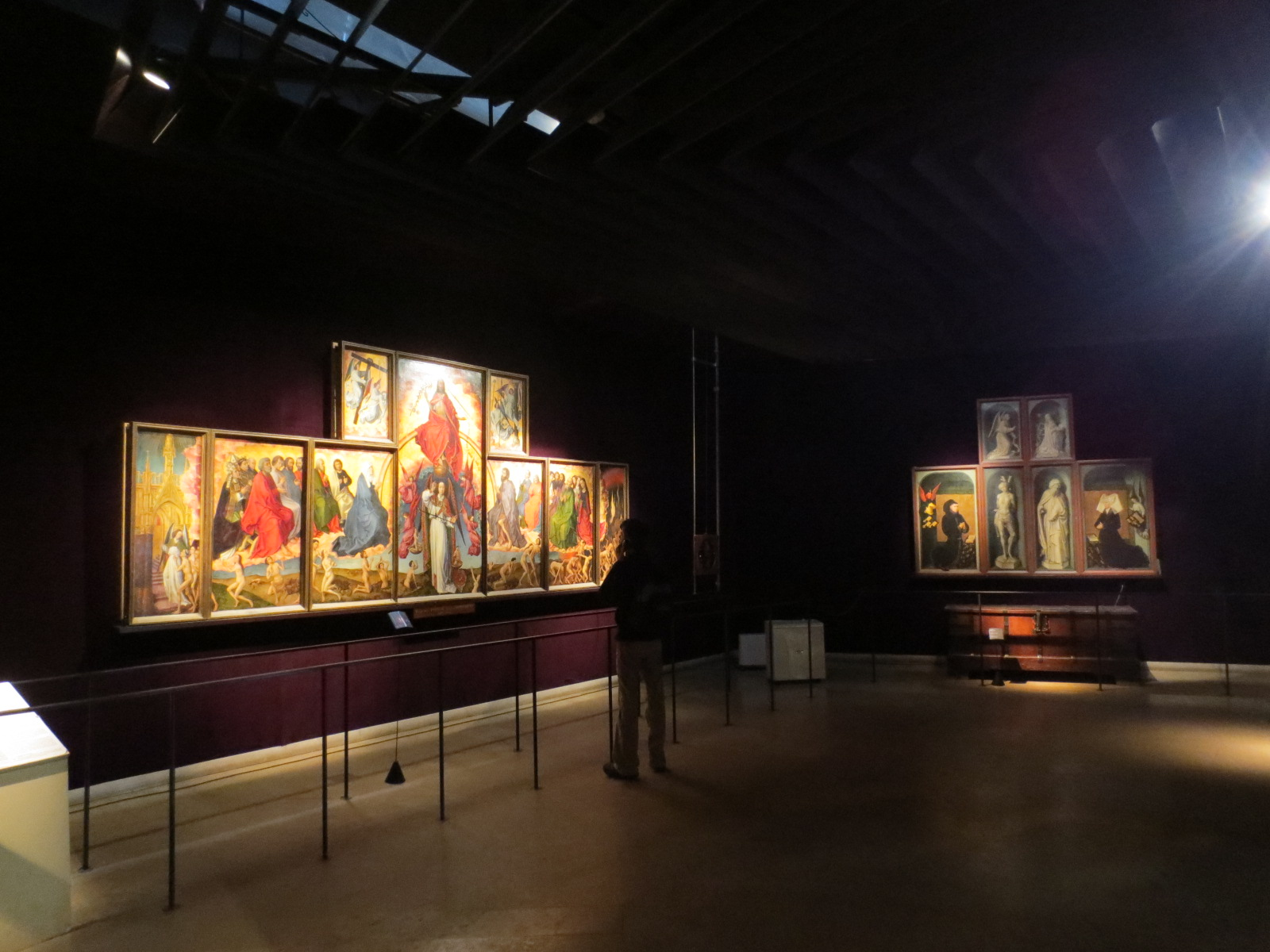 Polyptyque